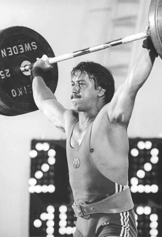 Joachim Kunz ADN-ZB Thieme 24.06.1989 K.-M.-Stadt-DDR-Meisterschaften im Gewichtheben-Im Mittelgewicht gewann der Karl-Marx-Städter Olympiasieger Joachim Kunz mit einer Zweikampfleistung von 330 kg (Reißen 145 kg-Stoßen 185 kg) .